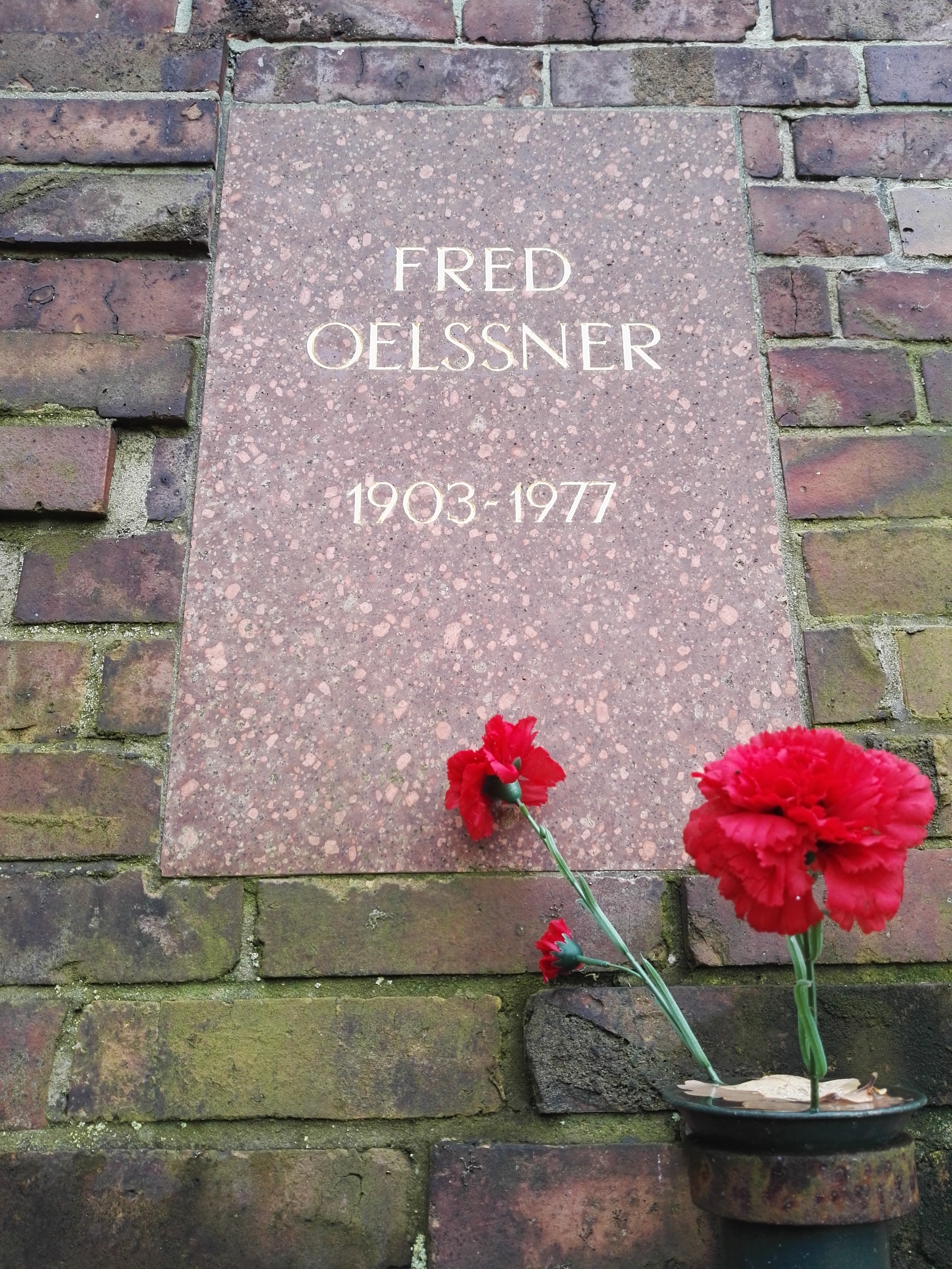 Grab von Fred Oelßner in der Gedenkstätte der Sozialisten auf dem Zentralfriedhof Friedrichsfelde in Berlin-Lichtenberg